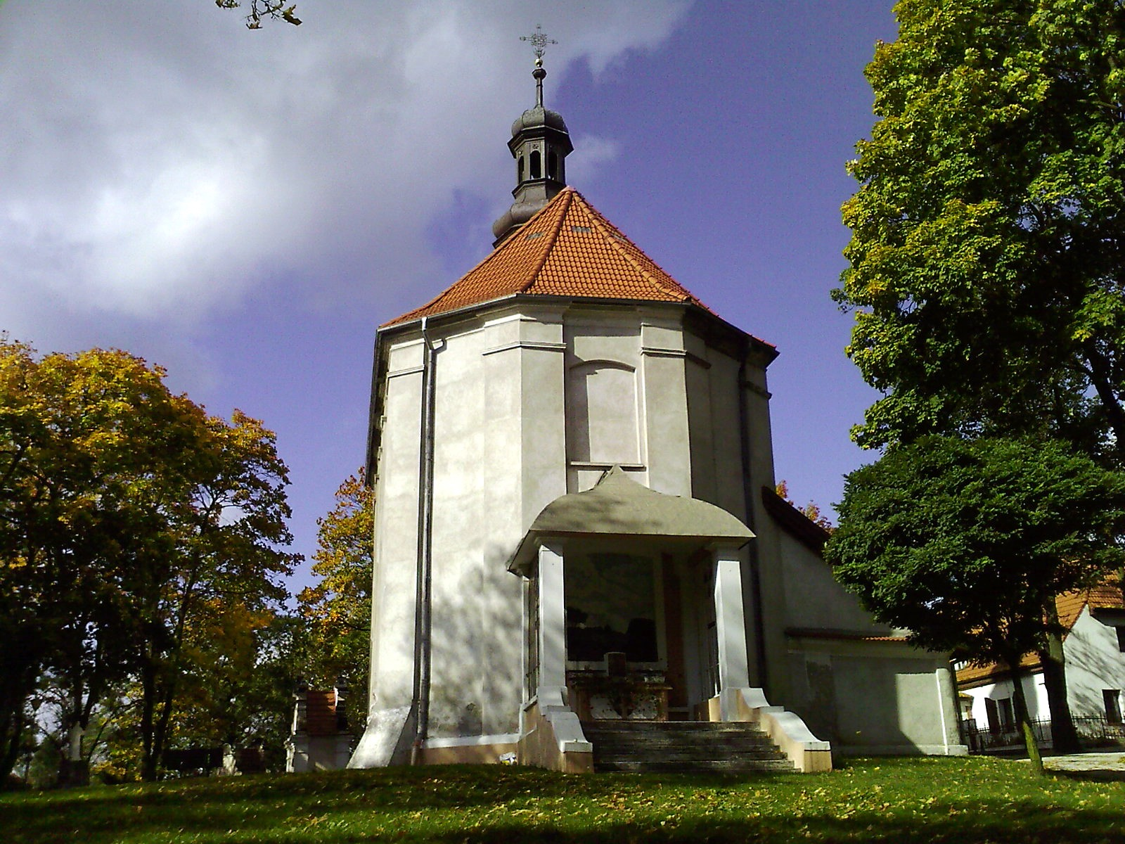 Pakość - XVII-wieczna kalwaria fundacji Działyńskich